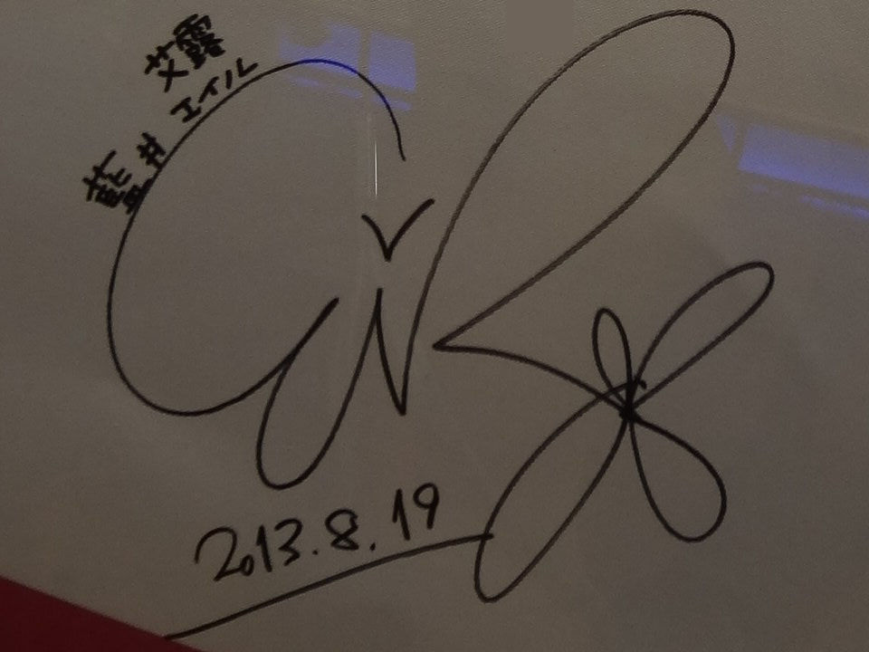 2013年（第14屆）漫畫博覽會的藍井艾露簽名。